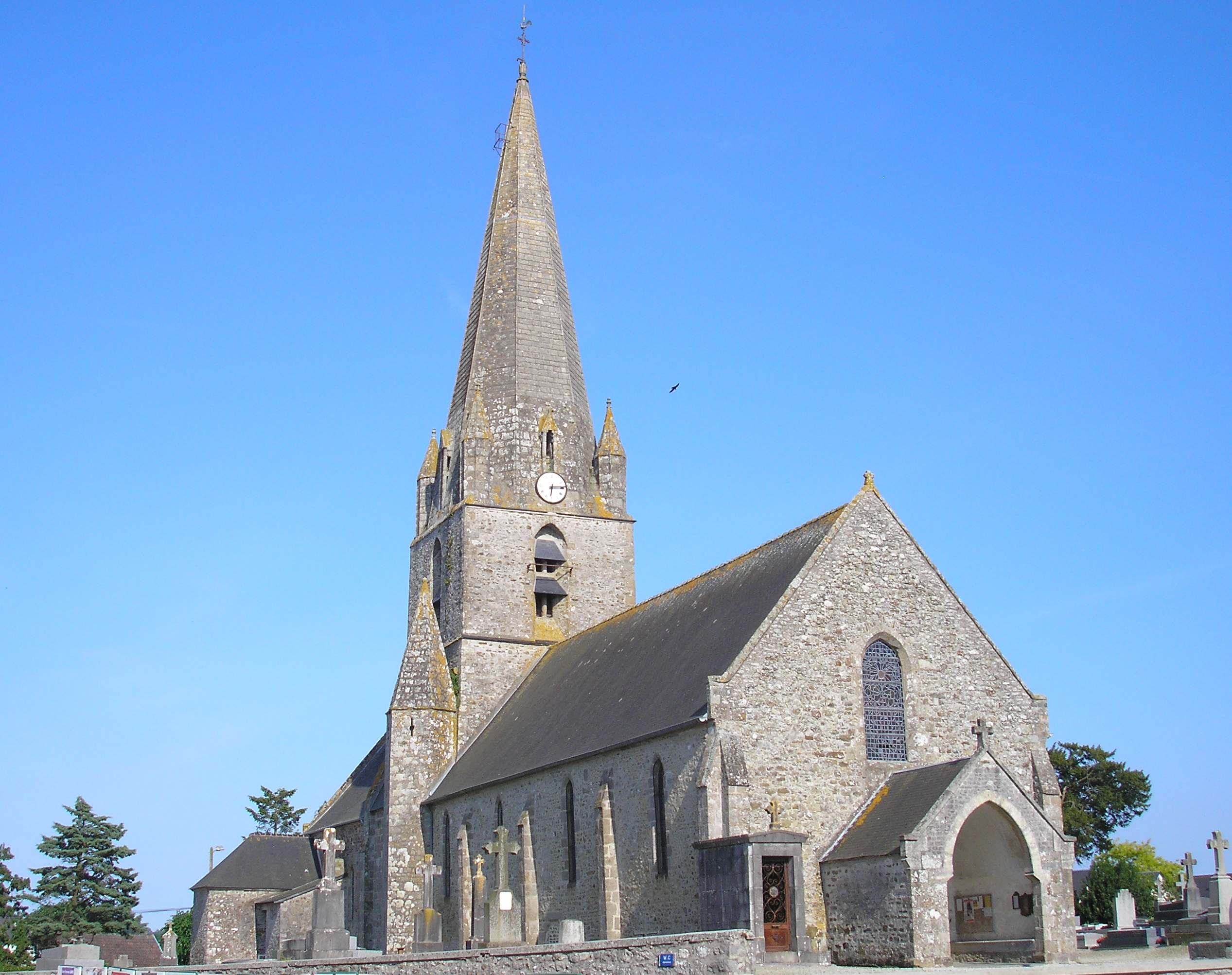 Quettreville-sur-Sienne (Normandie, France). L'église.